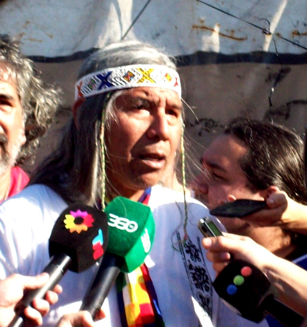 El qarashé Félix Díaz de los Qom en el acampe Qom en la Avenida 9 de Julio y Avenida de Mayo, en la ciudad autónoma de Buenos Aires.